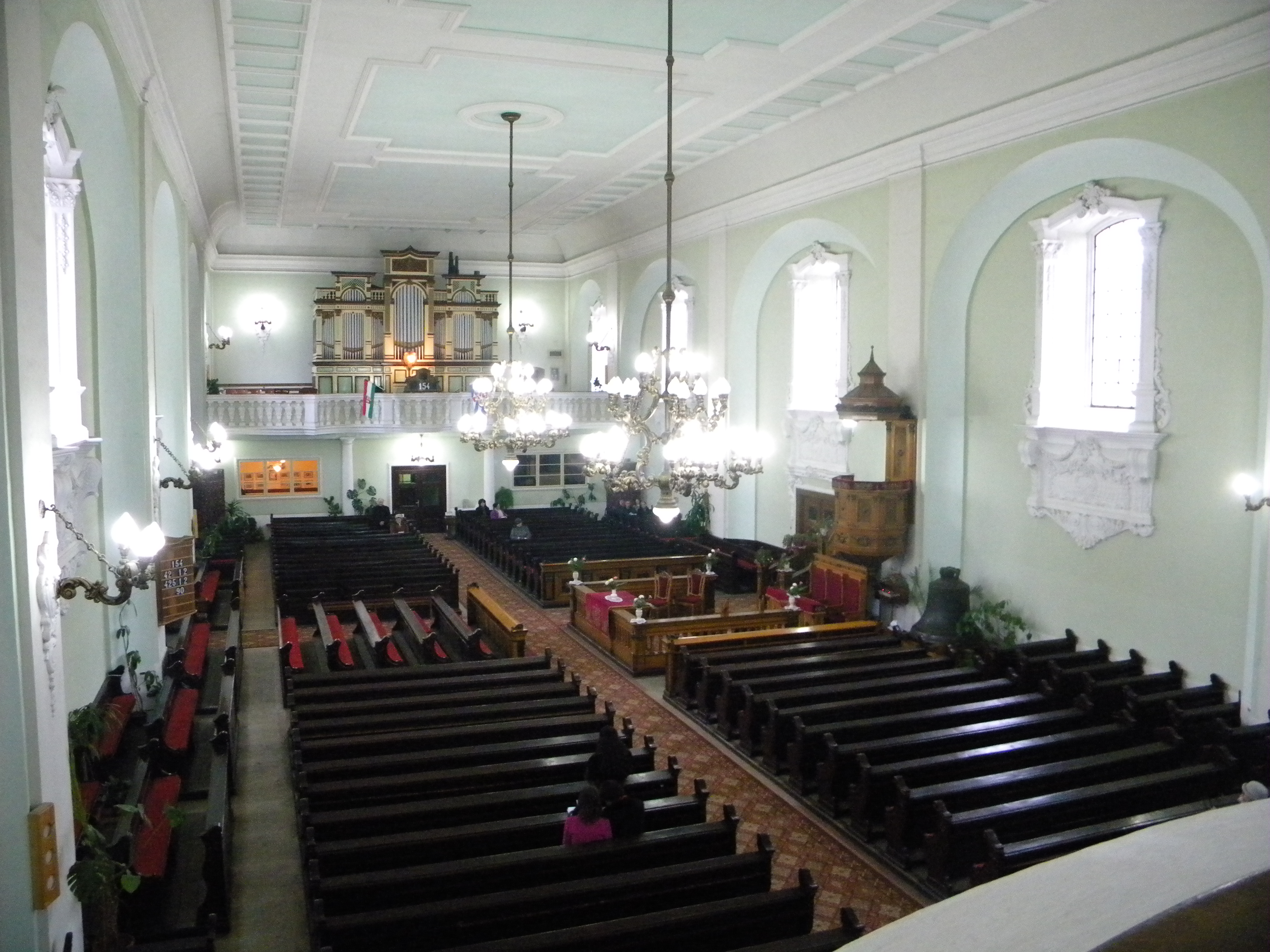 A Láncos templom belső tereRomână: Biserica cu lanturi - interior